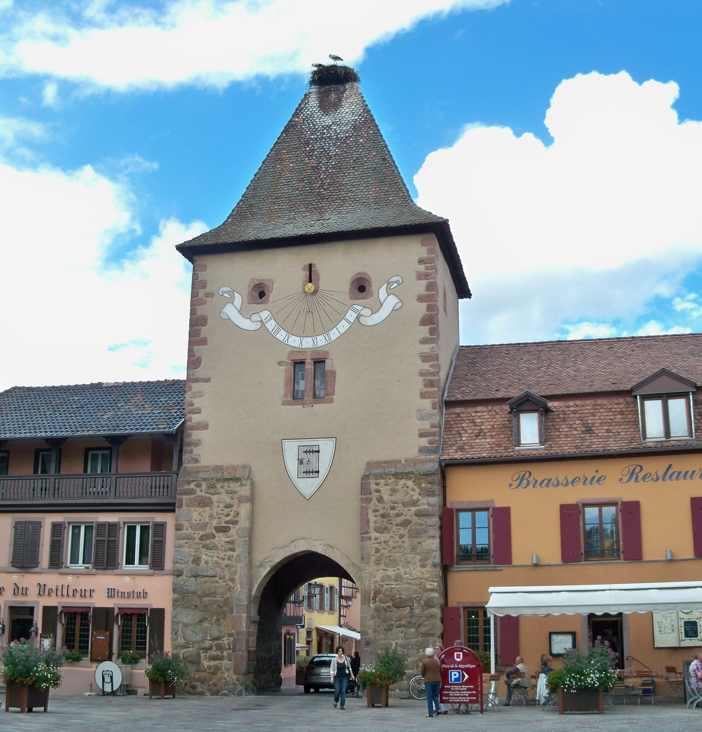 Porte de France de Turckheim (68) .